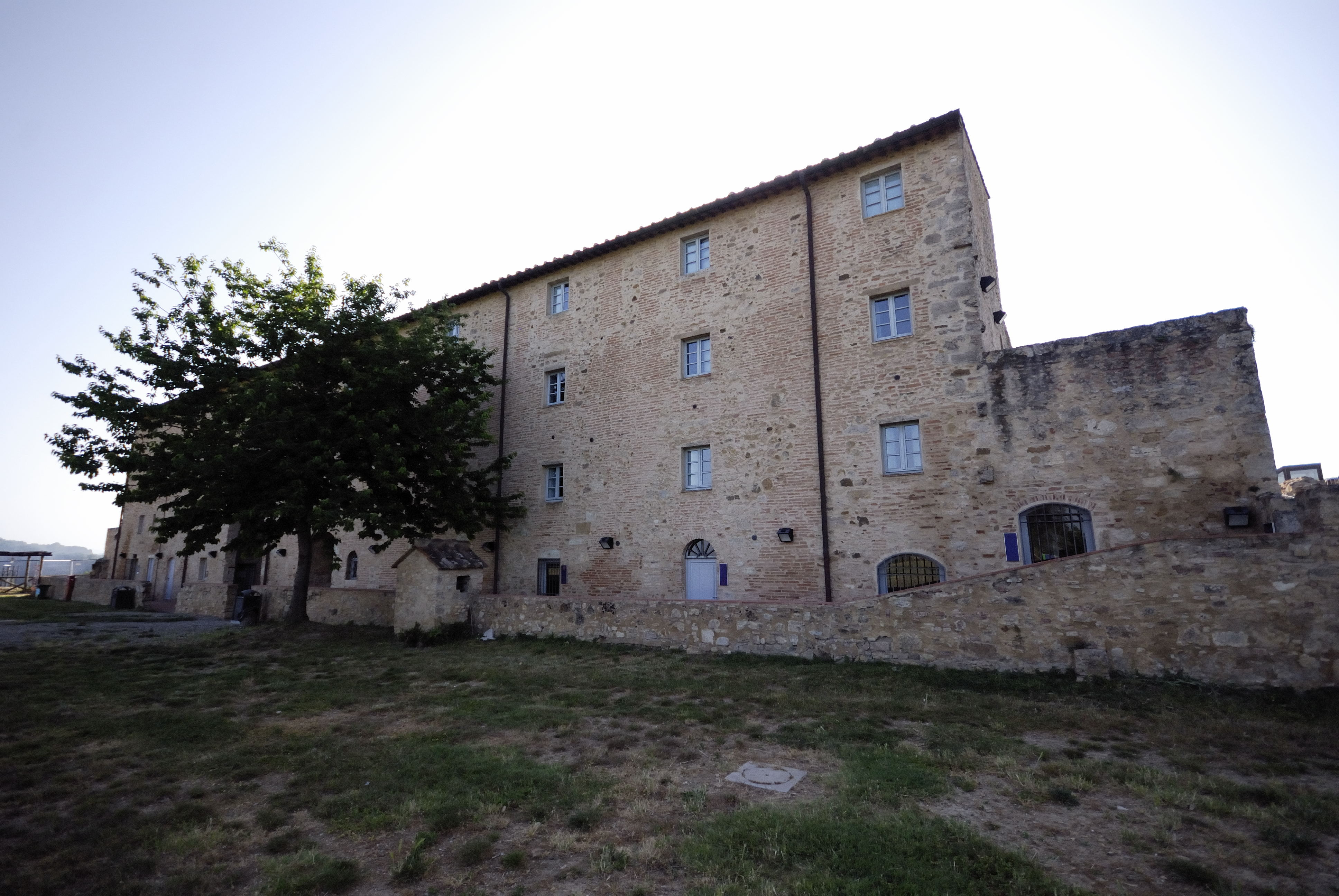 Mastio della Fortezza medicea di Poggio Imperiale - Poggibonsi - Siena